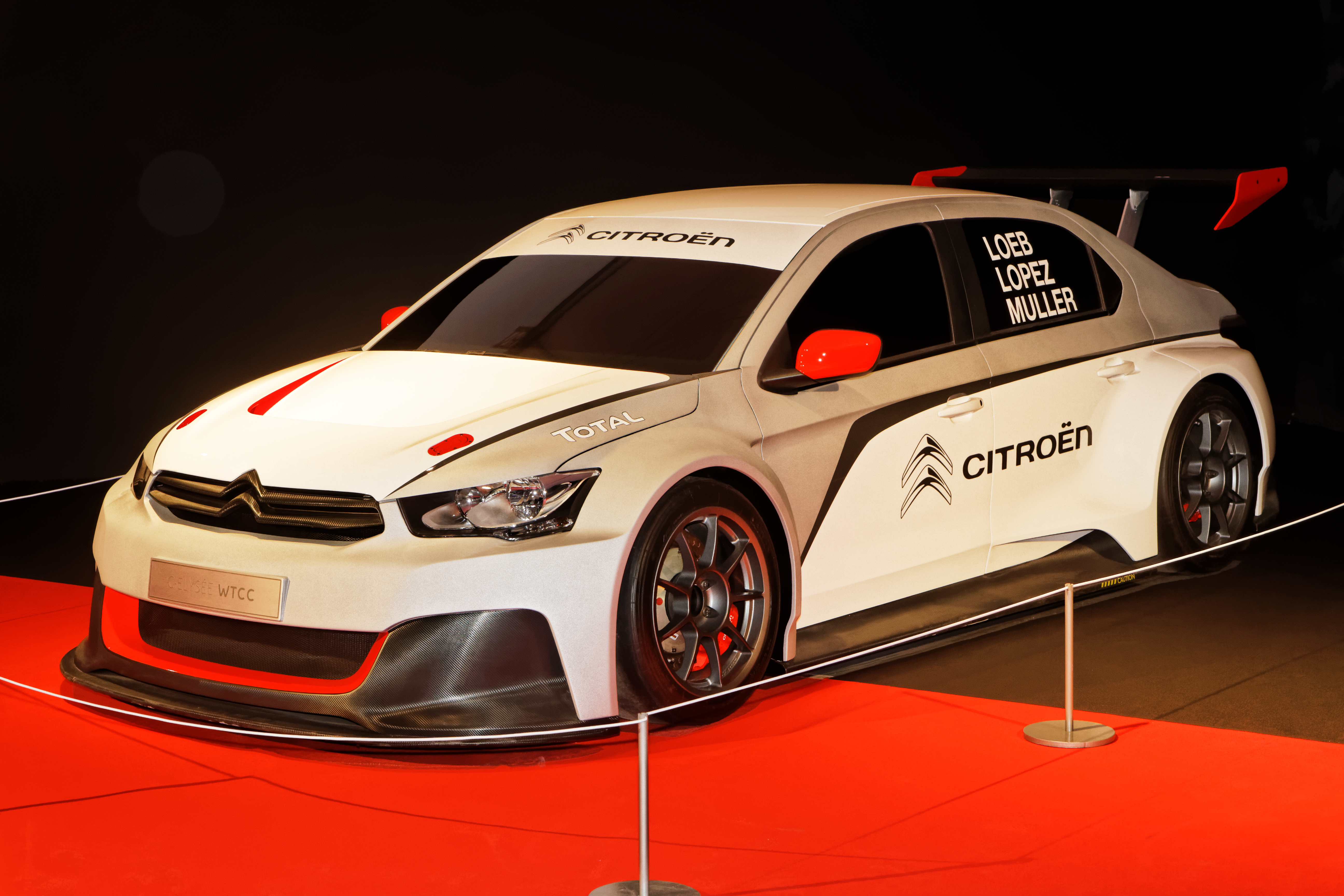 La Citroën C-Elysée exposée lors du festival automobile international 2014.